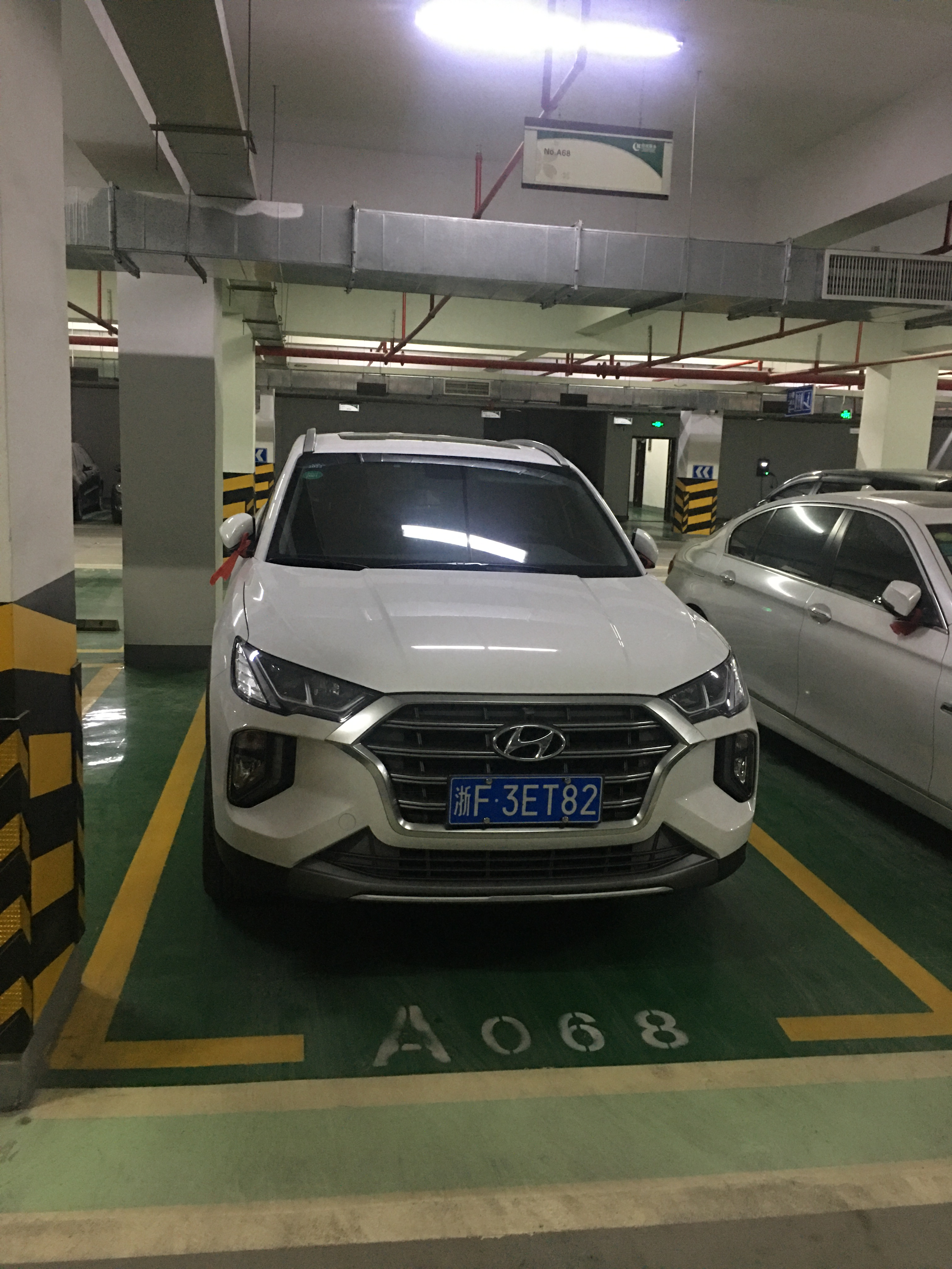 中文（中国大陆）: 用于现代途胜页面